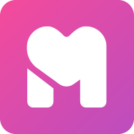 Logo de Mi Media Manzana